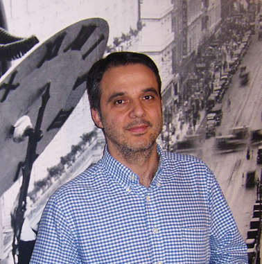 Miguel Ángel Huerta